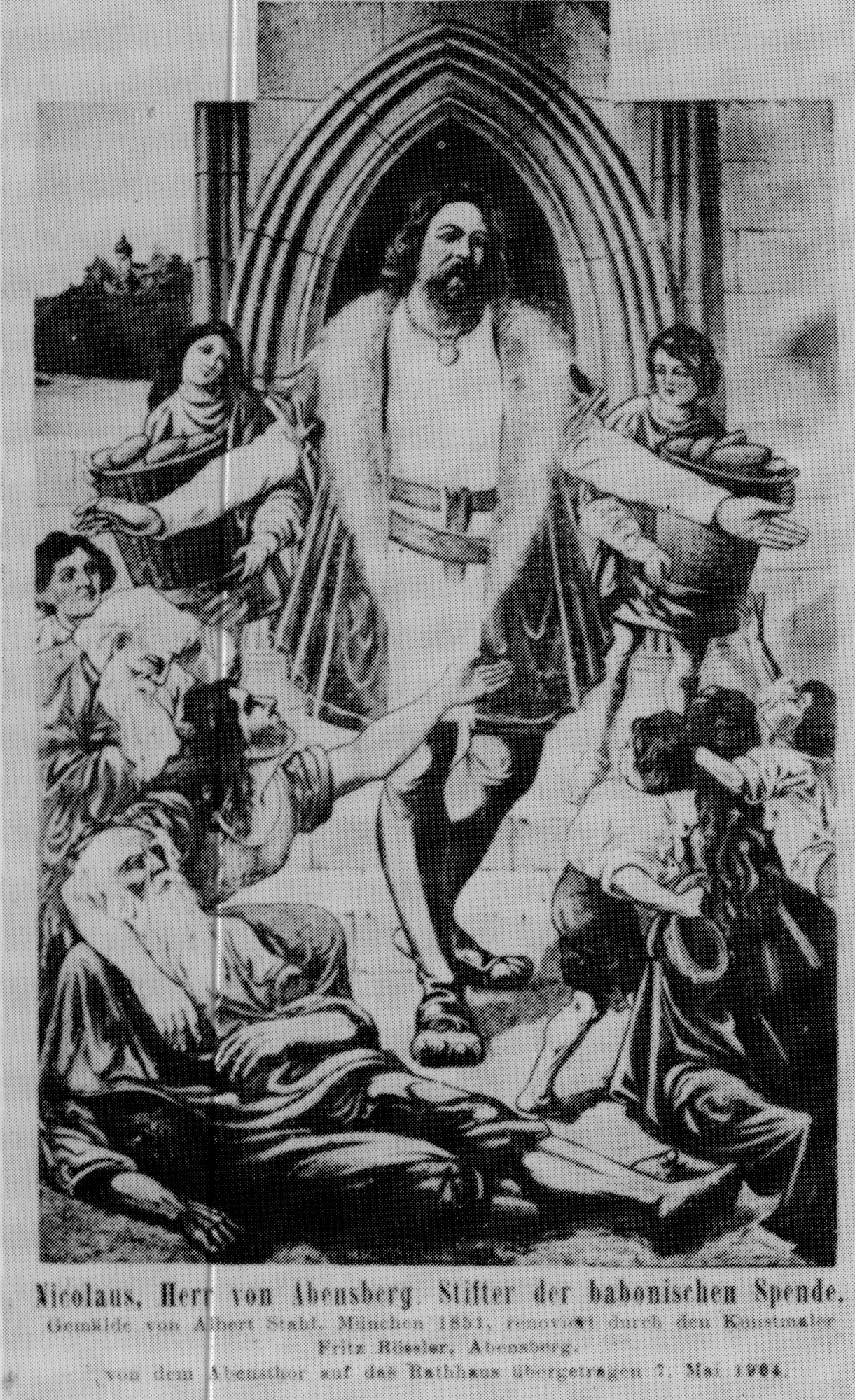 Niklas, letzter Herr von Abensberg: Stifter der Babonenspende